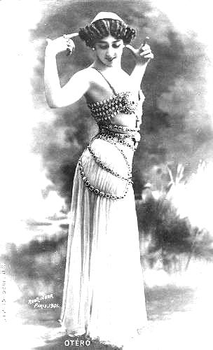 La Belle Otéro, spanische Tänzerin